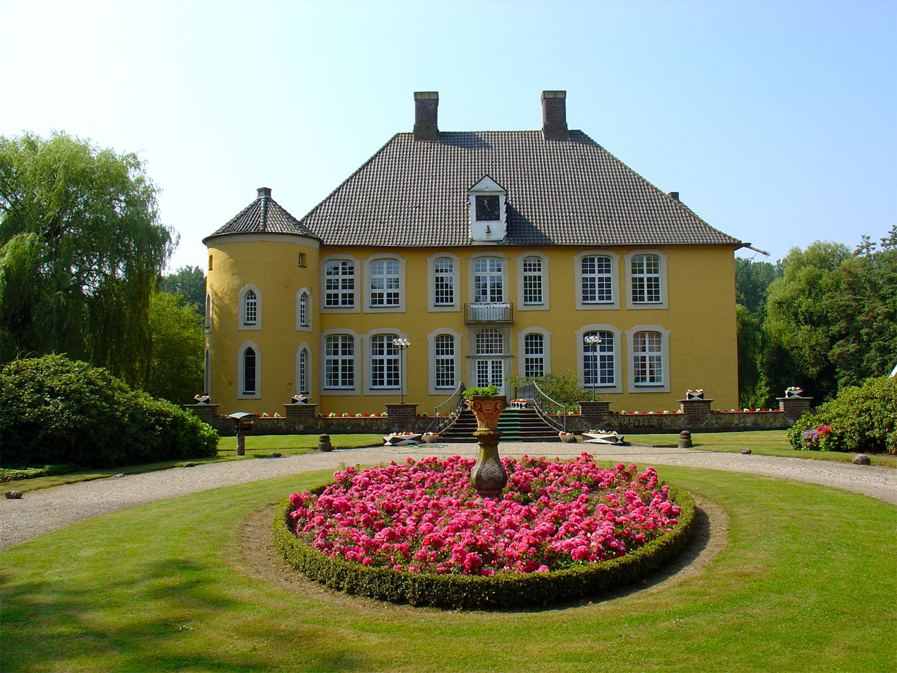 Huis Diepenbock (Bocholt)